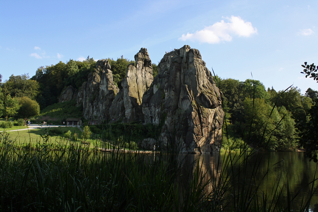 Externsteine, Aufnahme aus dem Jahr 2009.